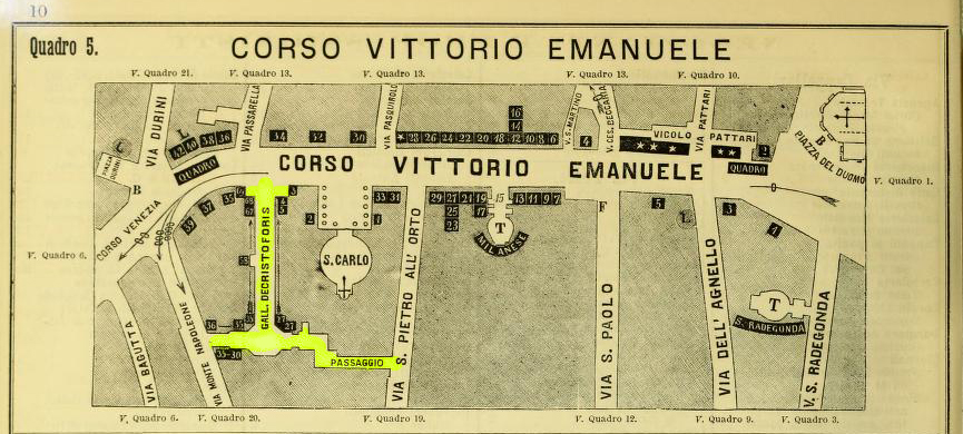 Mappa comprendente la Galleria de Cristoforis nel 1881; l'immagine è tratta da Nuova guida della città di Milano e sobborghi pel 1881, ideata e compilata da G. Savallo reperibile presso